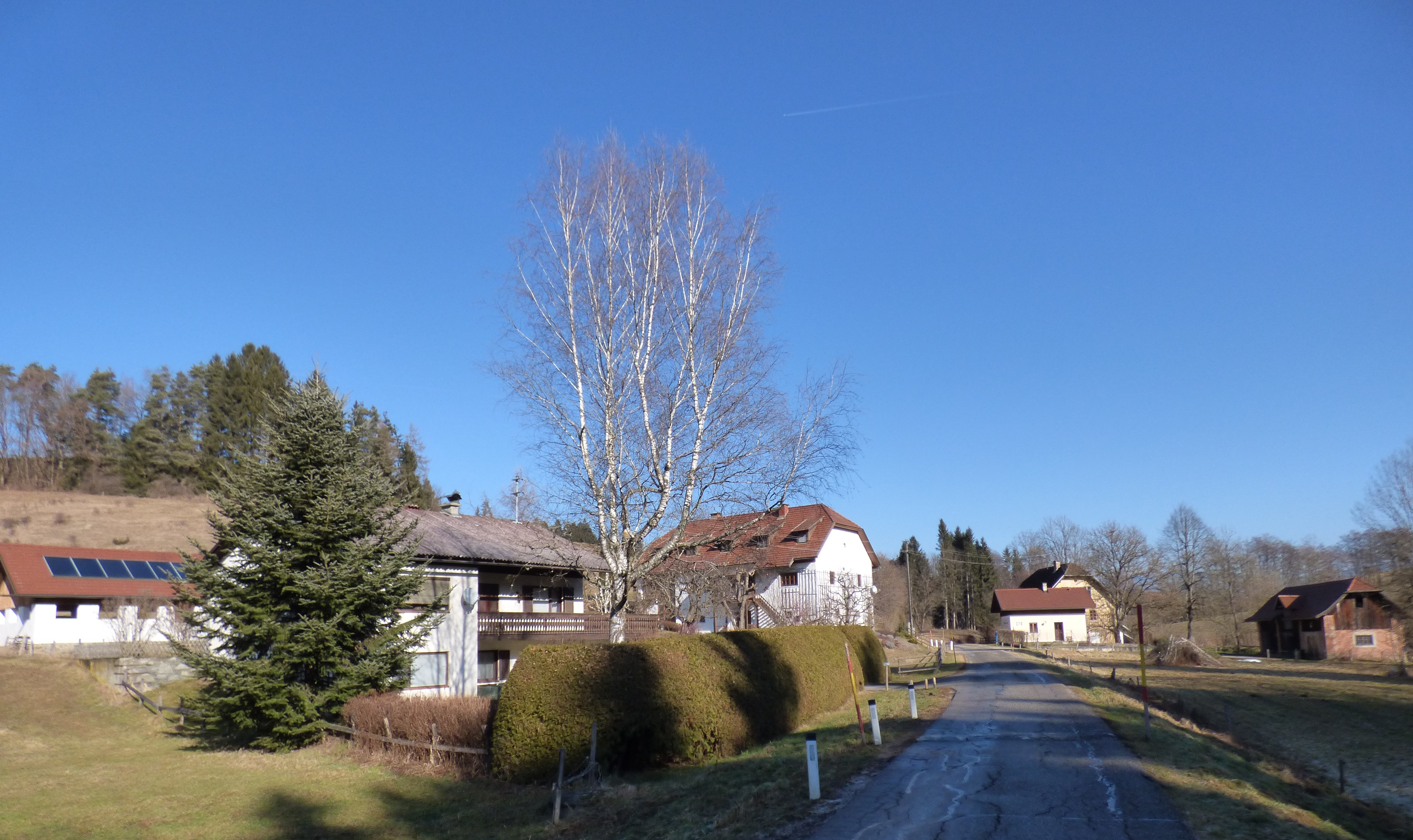 Strolz, Teil der Ortschaft Mairist, Gemeinde Sankt Veit an der Glan